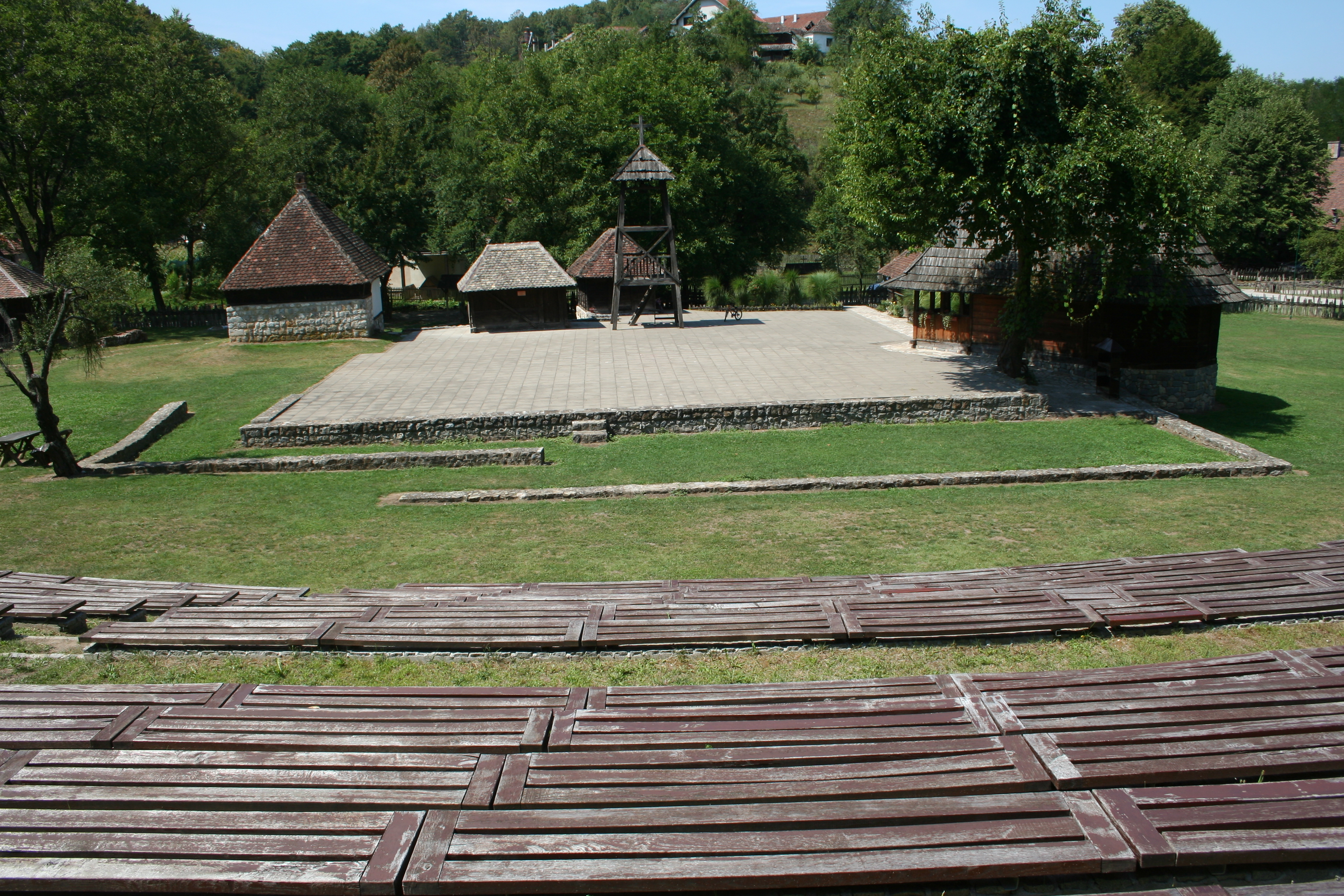 Saborište u Tršiću